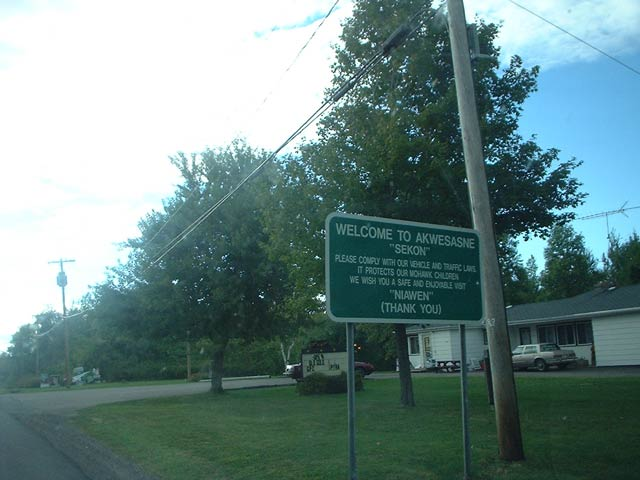 Road sign in Akwesasne.